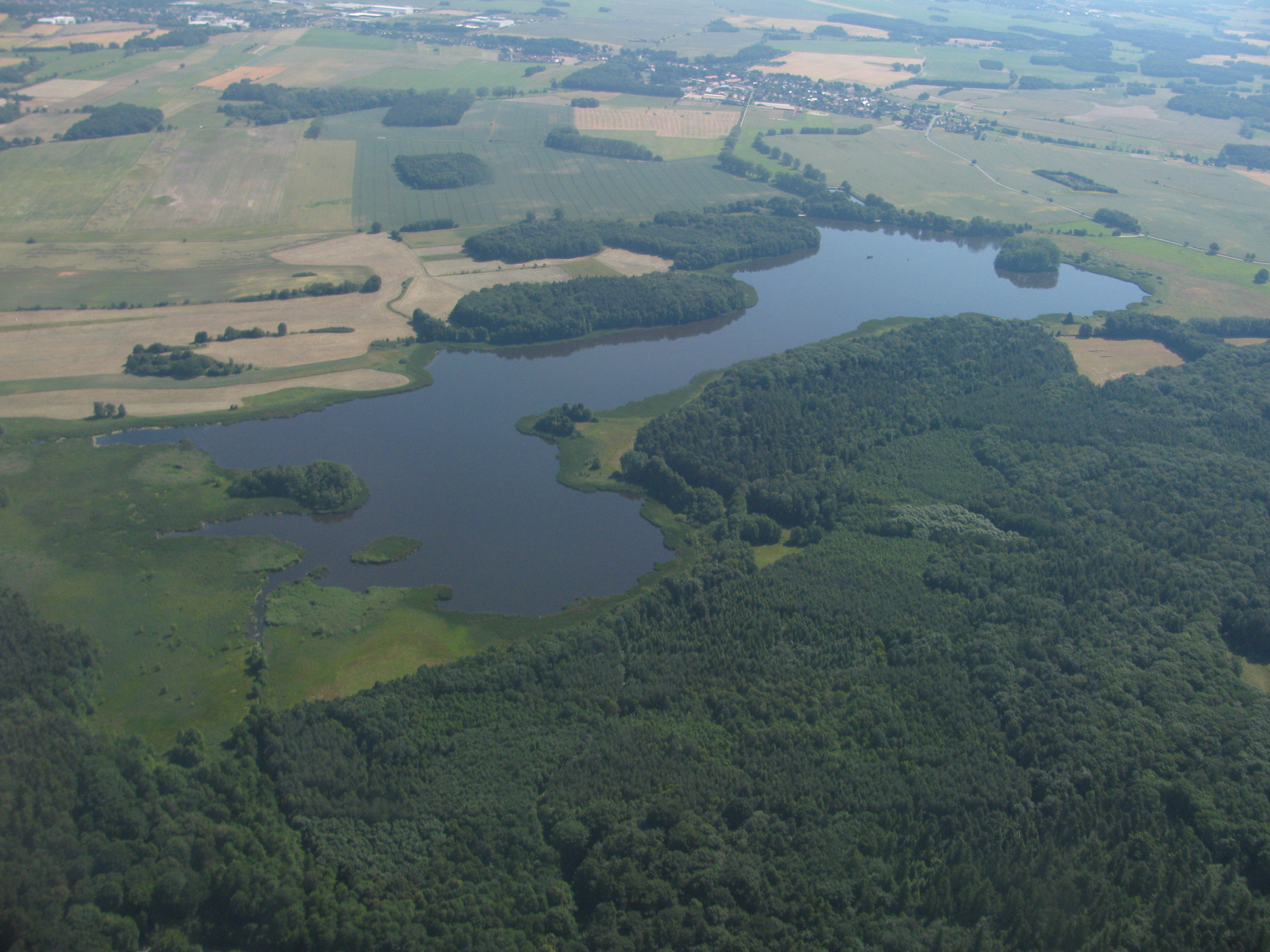 Luftbild Frauenteich, Moritzburg